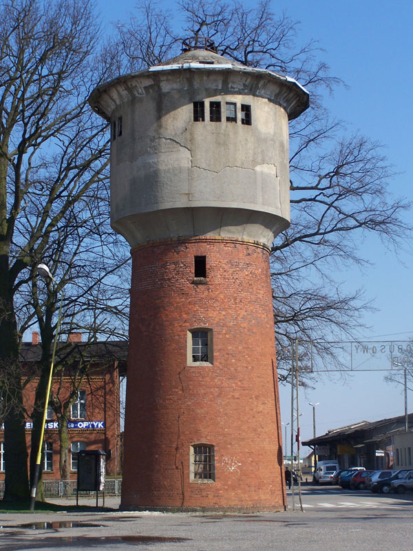 Wieża ciśnień w Nowogardzie z 1882 r,.